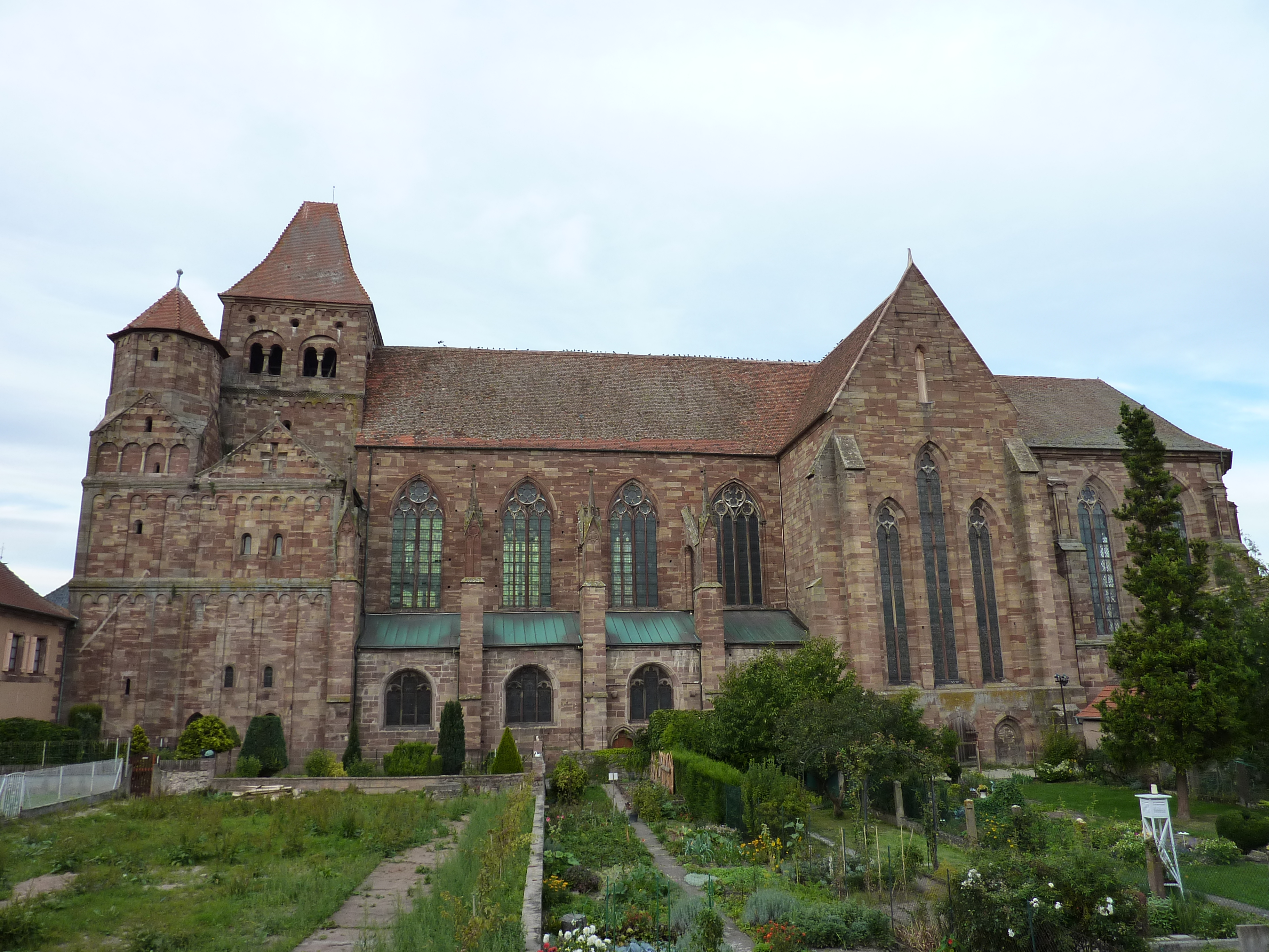 Alsace, Bas-Rhin, Marmoutier, Abbatiale Saint-Etienne, Façade sud